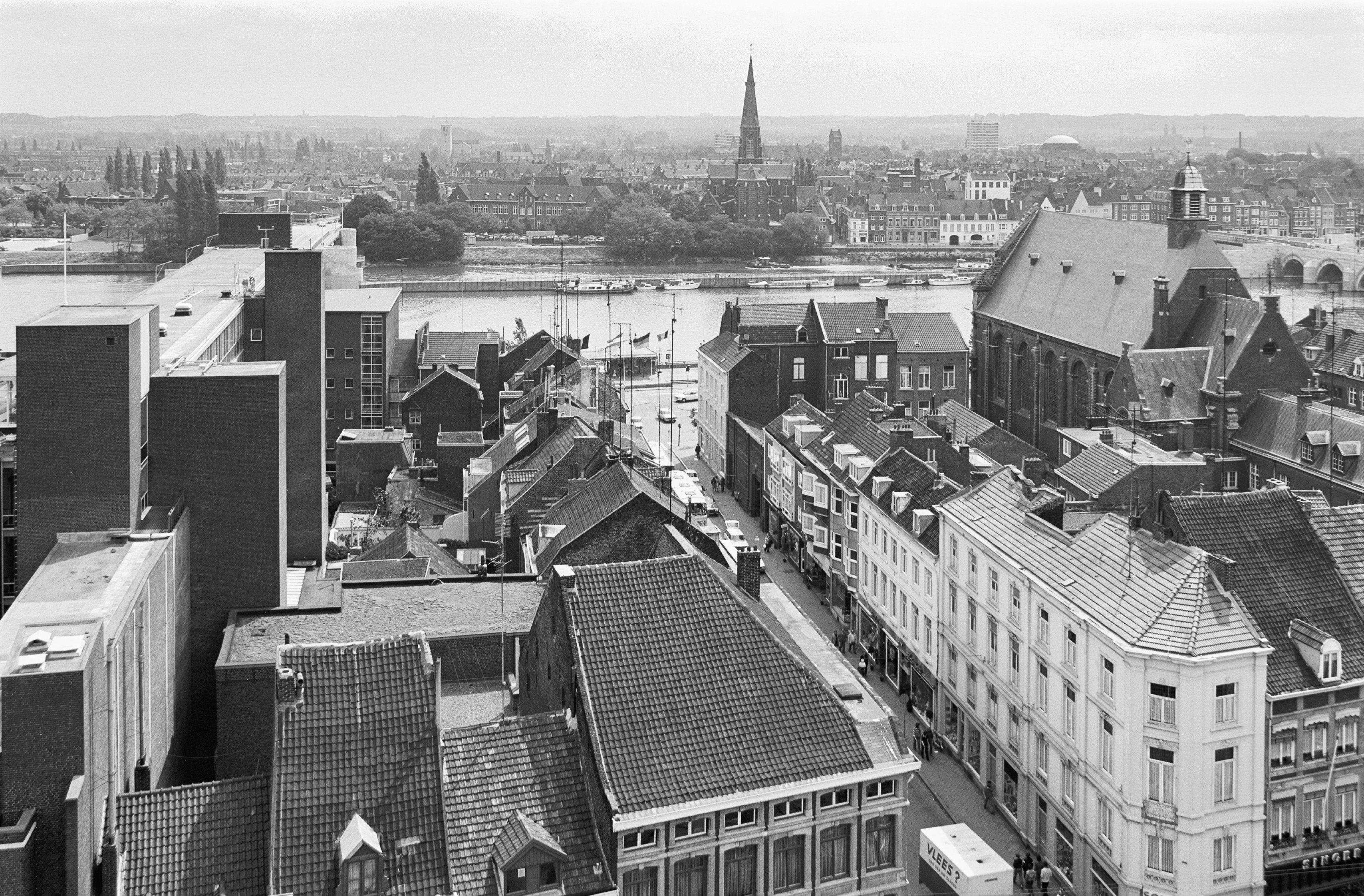 Overzicht: overzichten vanaf stadhuis